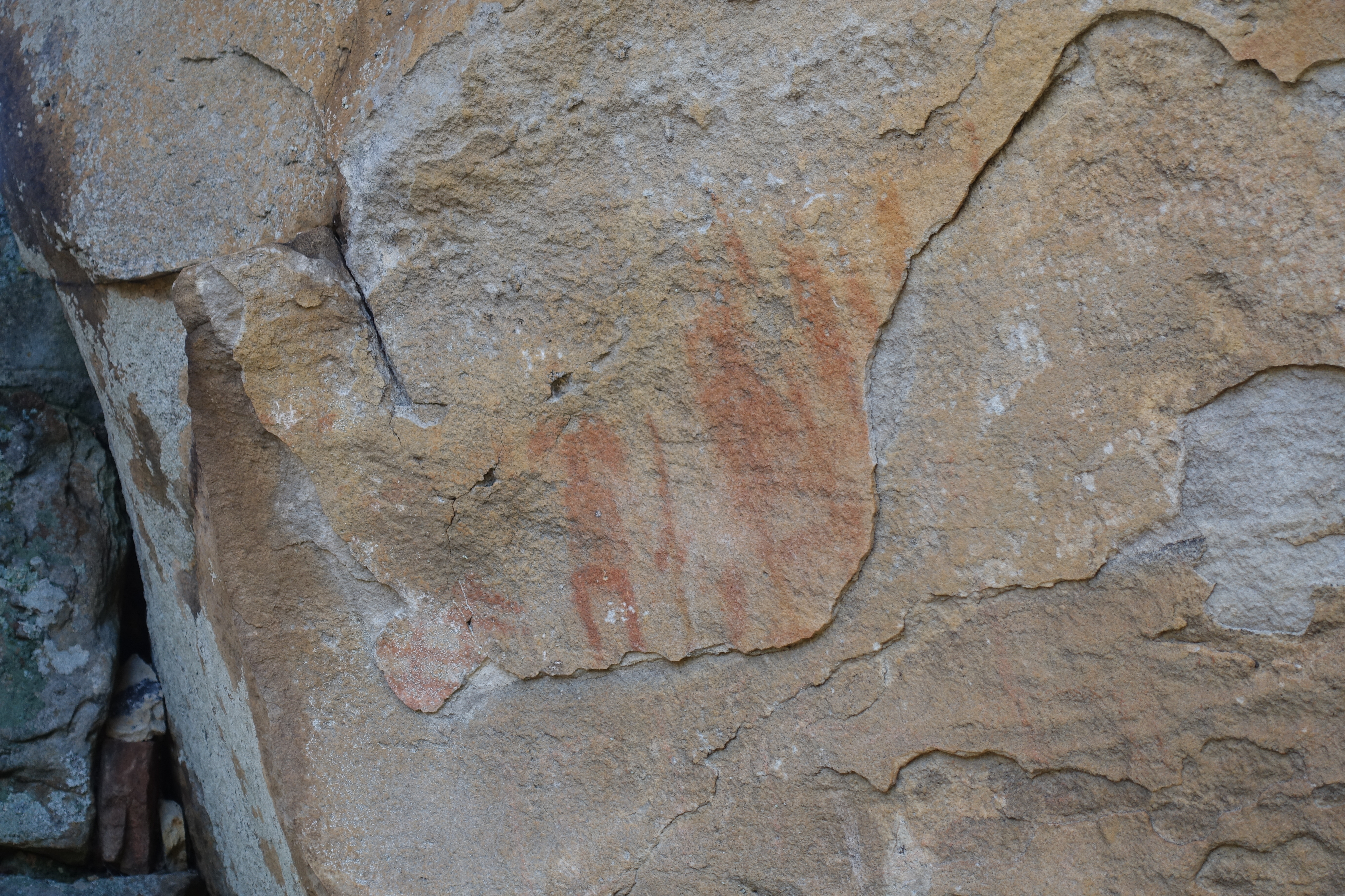 Estación rupestre de Peñón de la Visera, en el monte Valonsadero (Soria, España).